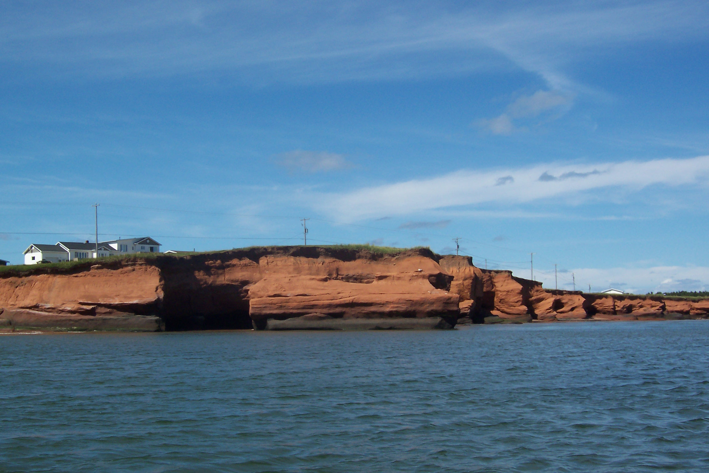 Falaise près de Cap-aux-Meules, Îles de la Madeleine